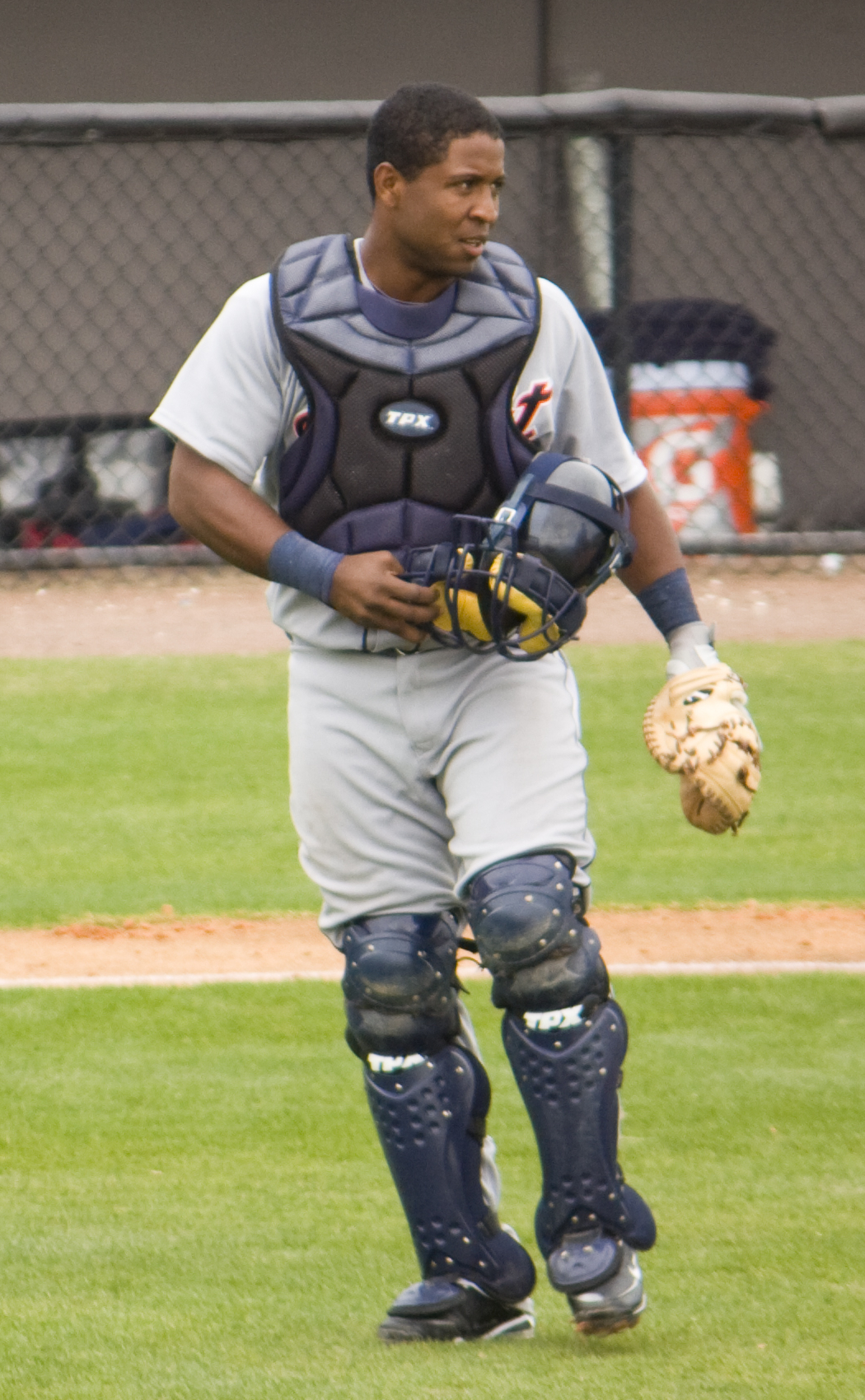 Robinzon Díaz